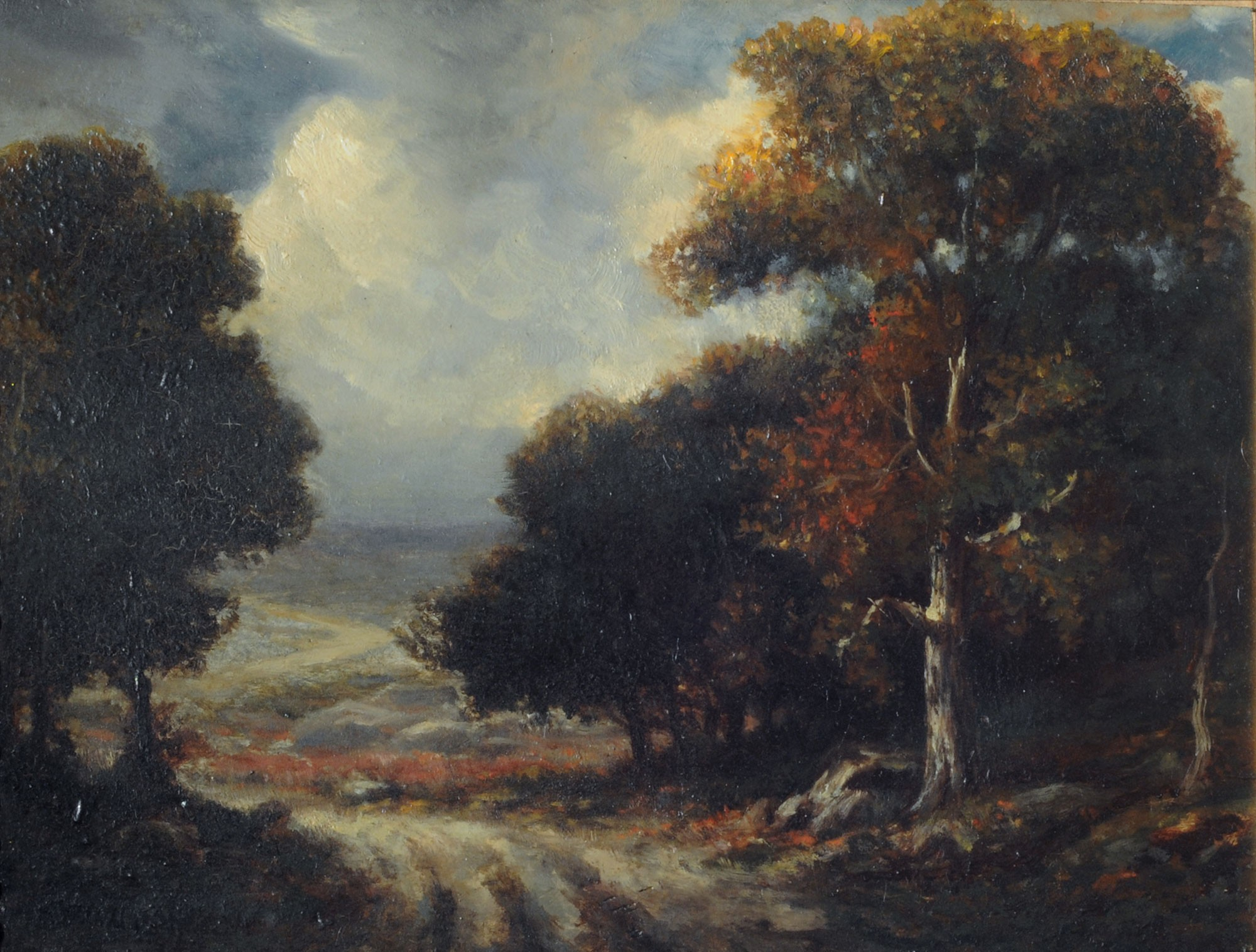 Narcisse-Virgile Díaz de la Peña, Le chemin. Siglo XIX.19 x 25 cm, con marco: 34,5 x 40,2 x 7 x 8,5 cm, óleo sobre tabla. Inv. 2100.